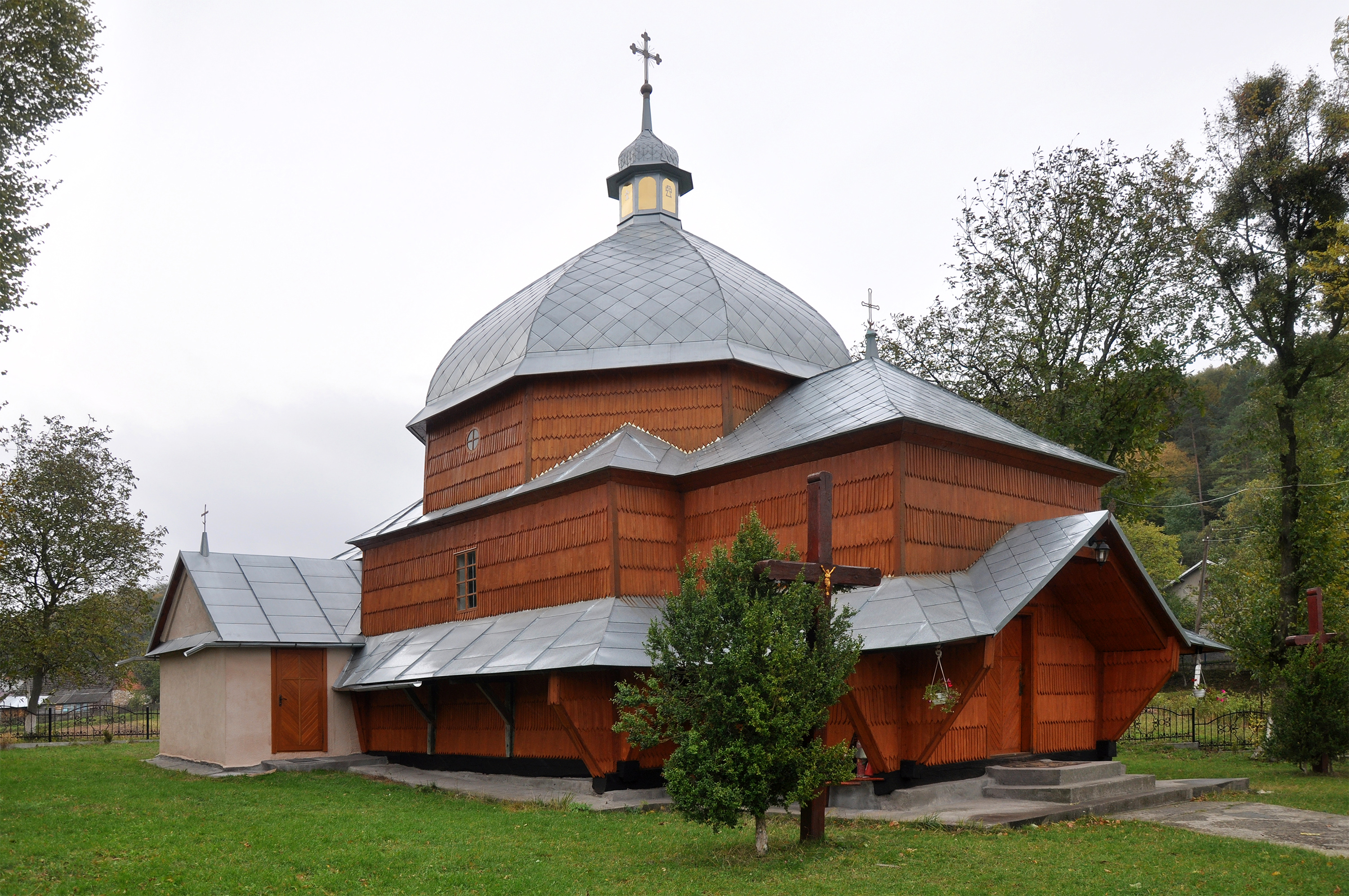 Церква Покрова Богородиці (дер.), Митулин